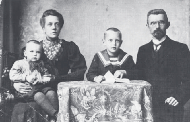 Jan Veldkamp (1868-1946), onderwijzer, met zijn gezin (Aafje Dorsman, Cornelis Veldkamp en Berend Veldkamp), rond 1907. Veldkamp is bekend als de samensteller van de liedbundel "Kun je nog zingen, zing dan mee" (1906).